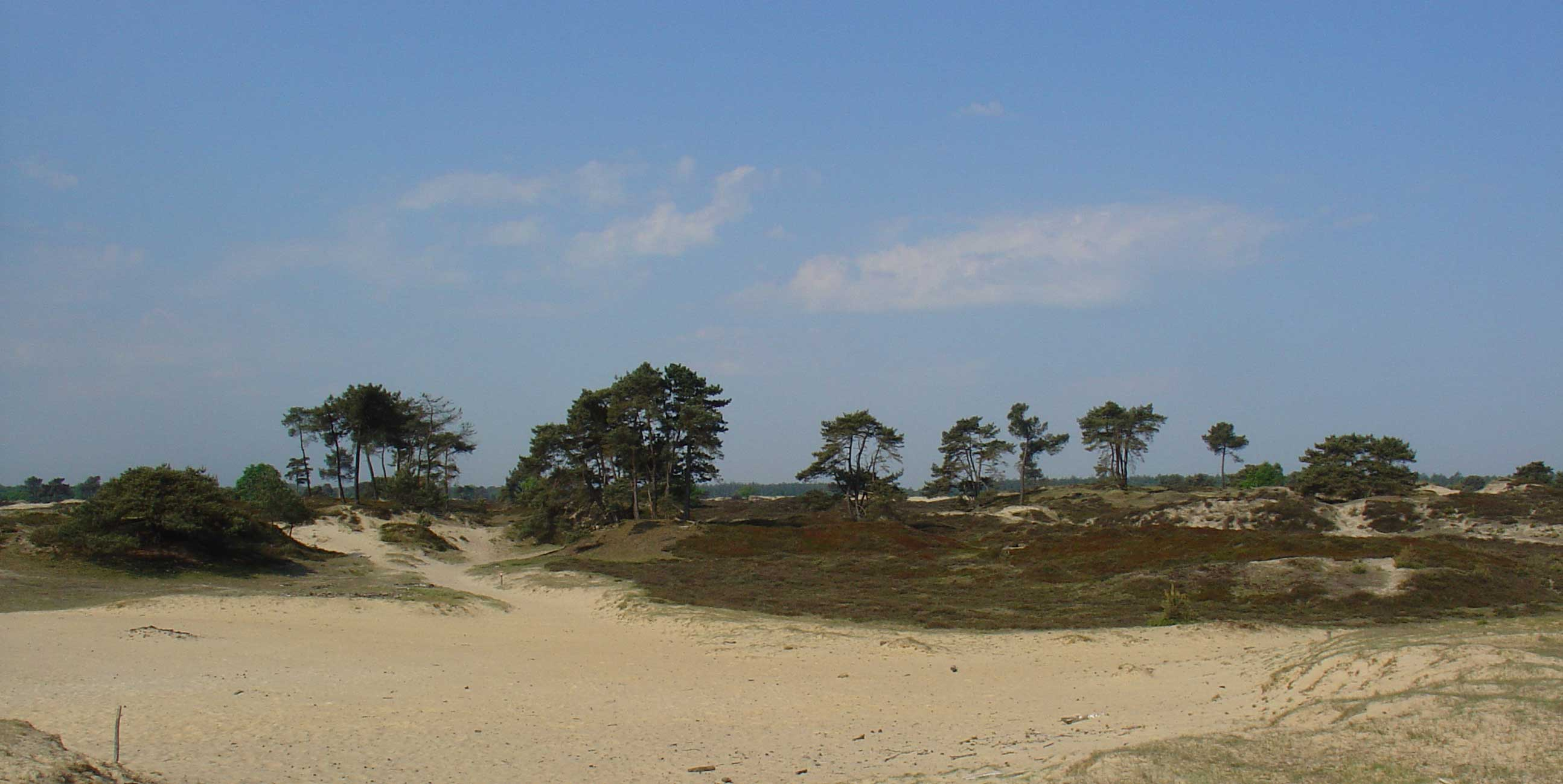 Het Aekingerzand, stuifzandgebied in het Drents-Friese Wold